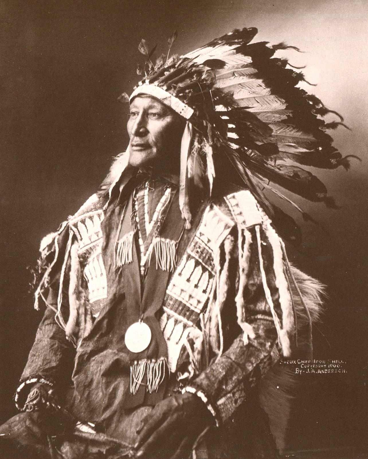 Sioux indianen Iron Shell